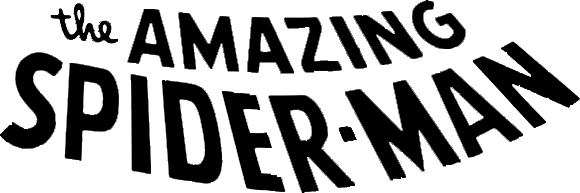 Titelschriftzug der Spider-Man-Comics ab 1962